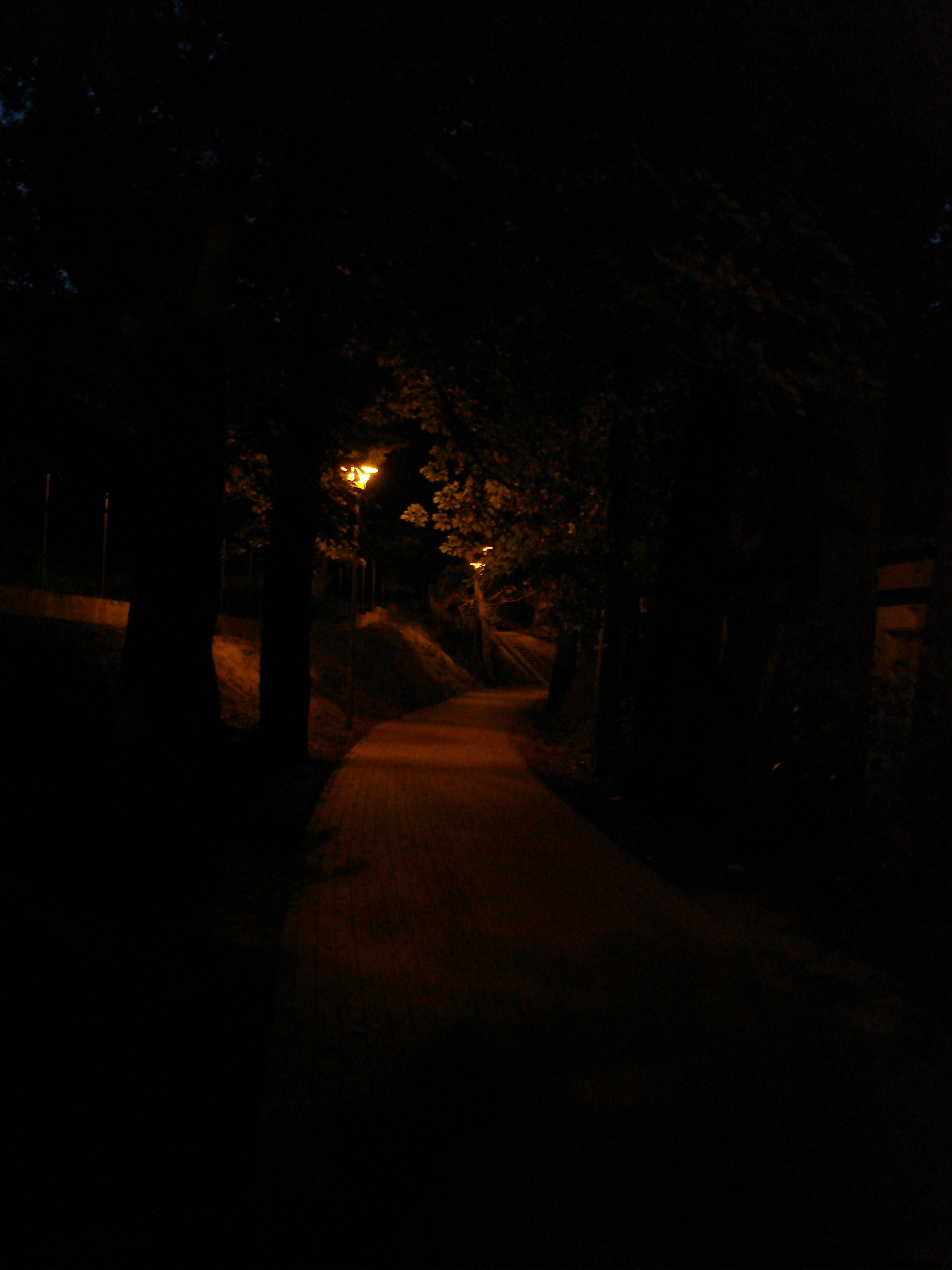 Promenada wraz ze ścieżką rowerową nocą nad Jeziorem Sępoleńskim; łącząca Plaże Miejską z centrum Miasta i Molo. Place in Sępólno Krajeńskie, Poland